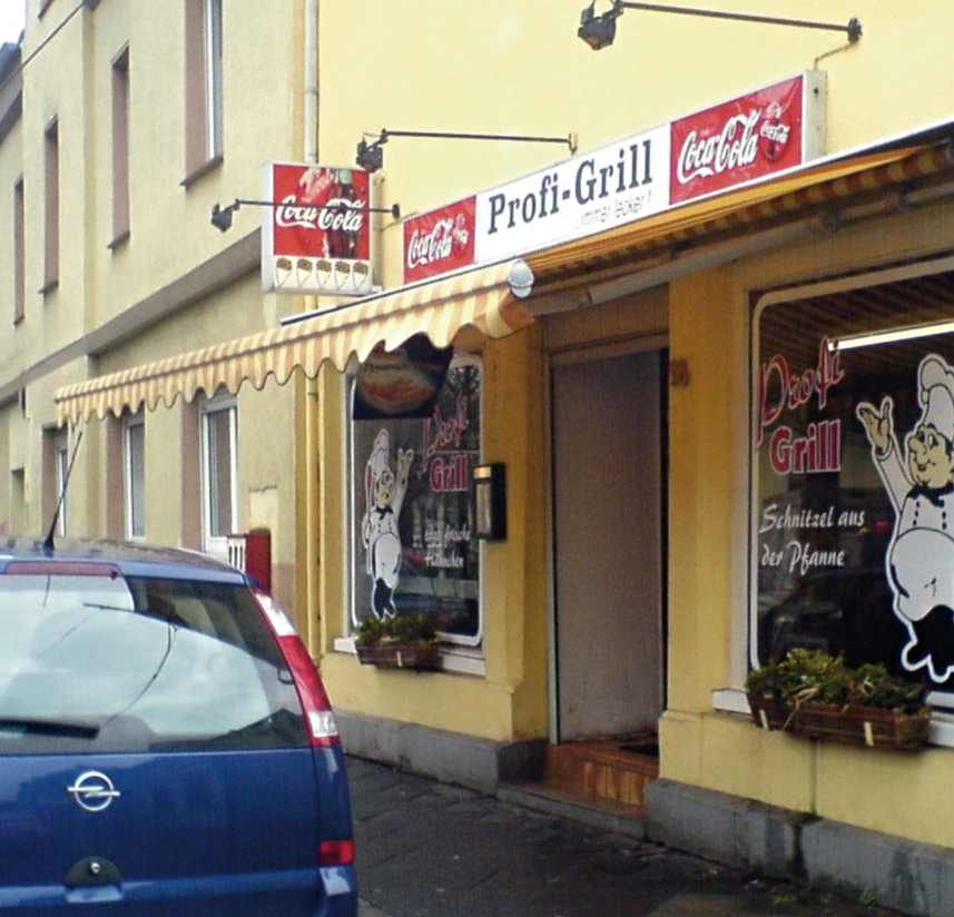 Imbissbude "Profi-Grill" in Bochum